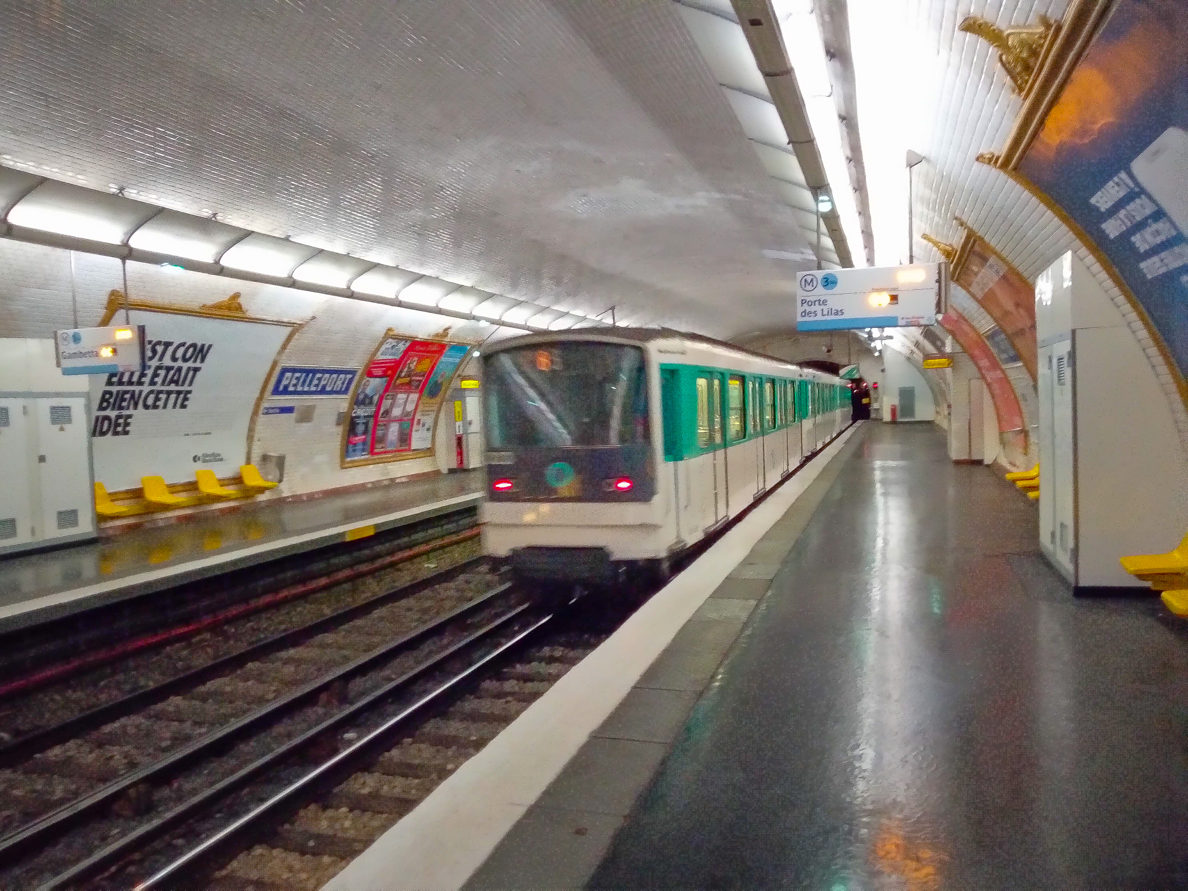 Photo d'un MF67 de la ligne 3bis au départ de la station Pelleport en direction de Porte des Lilas